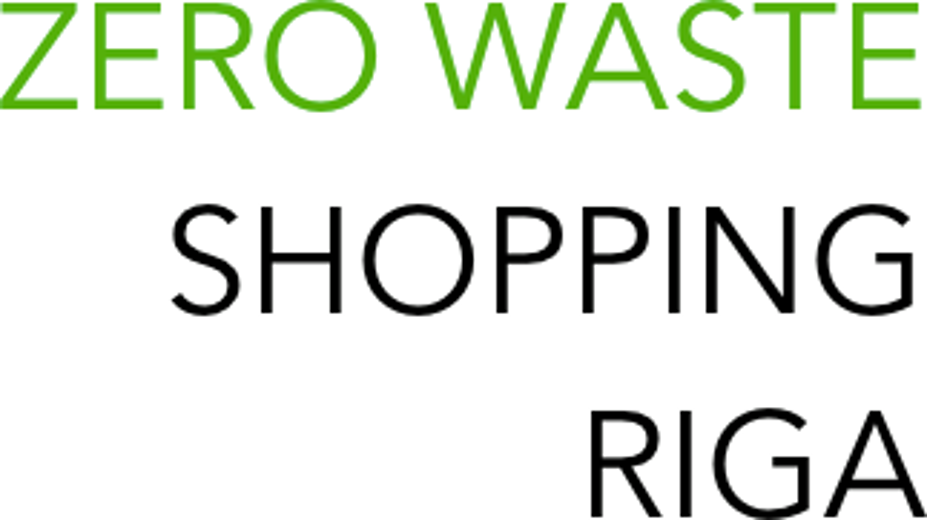 Zero Waste Shopping Riga logo